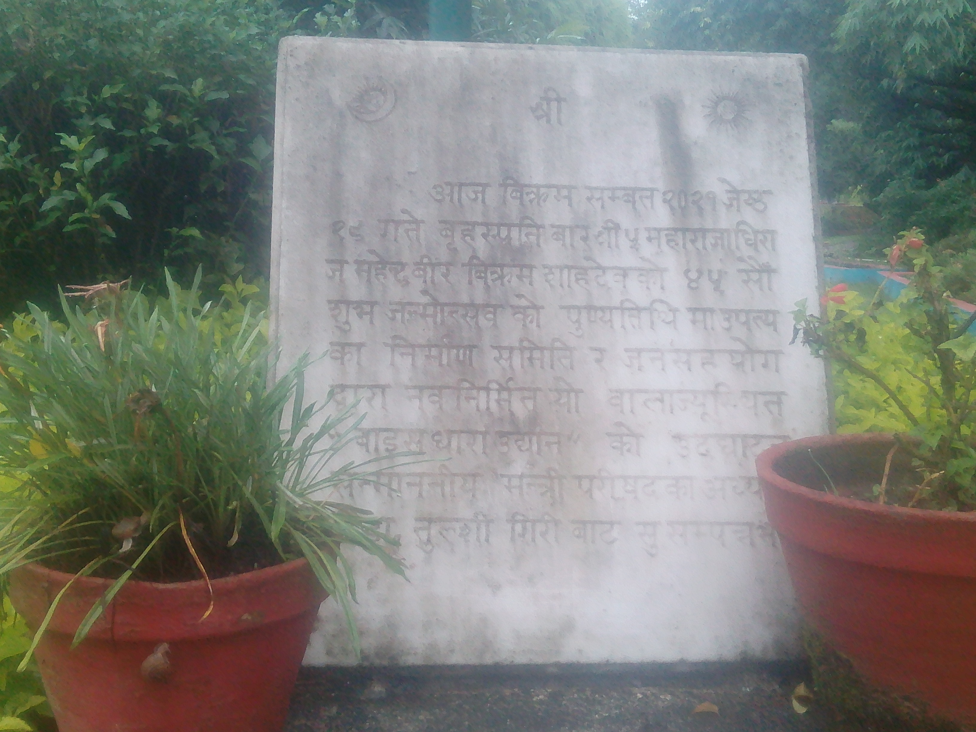 नेपाली: Baishadharaa park inaagiration by Dr Tulshi Giri on 2021 jestha 29